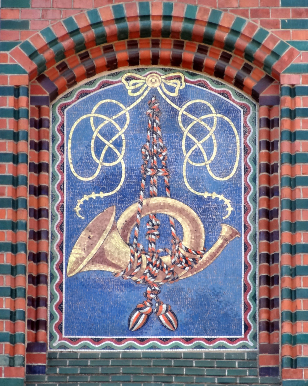 Budynek Poczty Głównej w Bydgoszczy przy ul. Jagiellońskiej (zbud. 1883 skrzydło płd, 1899 skrzydło płn)